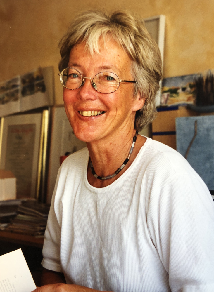 Bibbi Olsson 1999